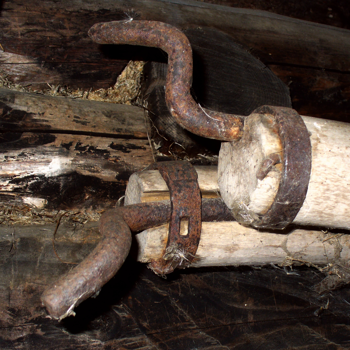 Оглобли для саней. Конец, крепящийся к саням. Витебская область.